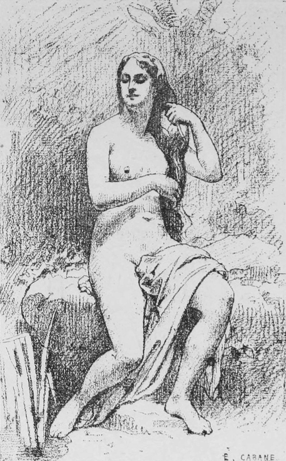 Nymphe